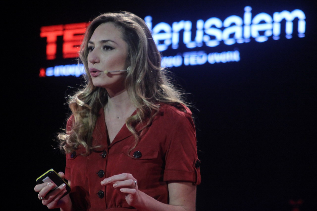 מיכל אנסקי מרצה בוועידת טד